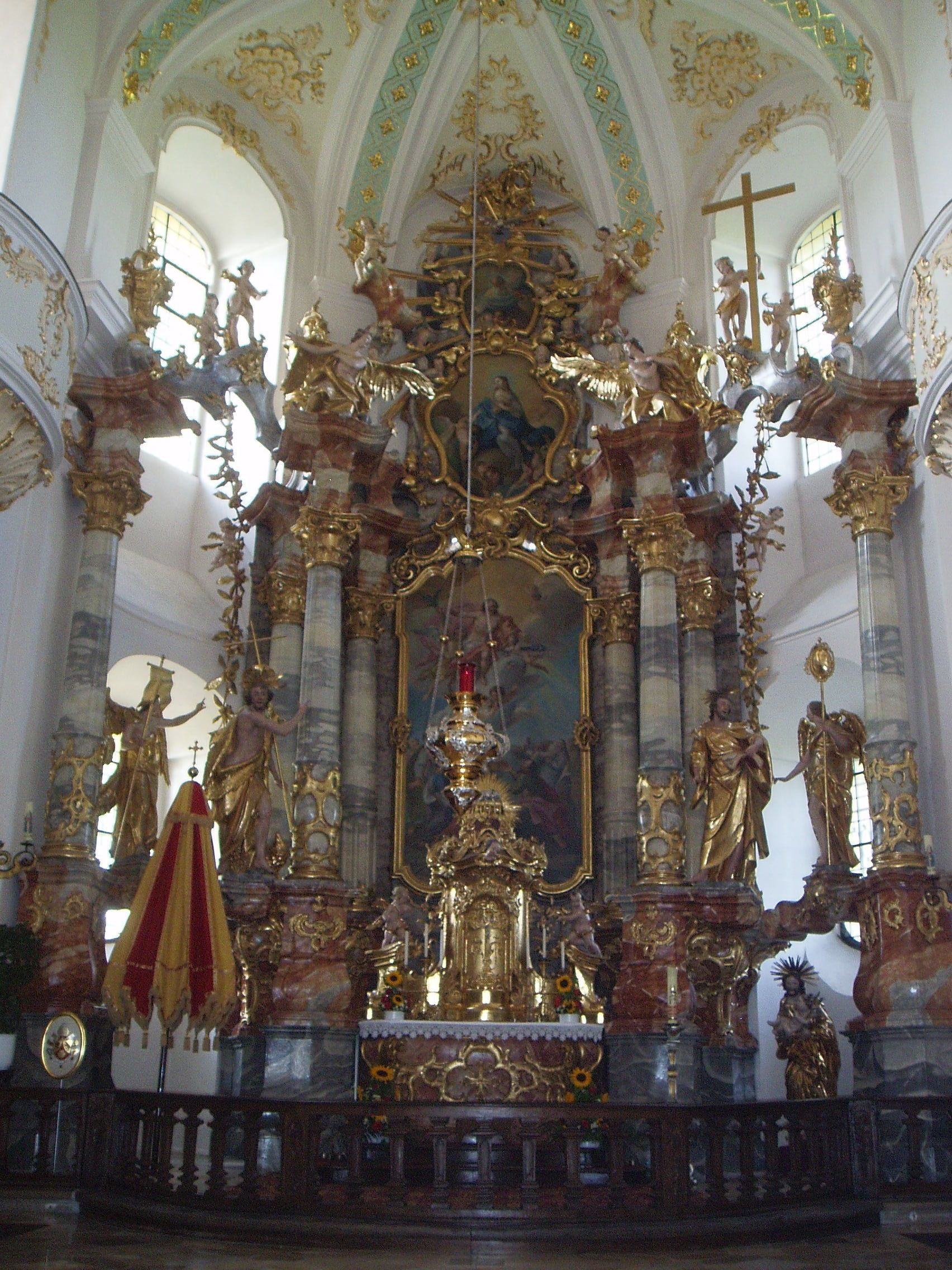 Chor von Maria Brünnlein mit Basilikainsignien